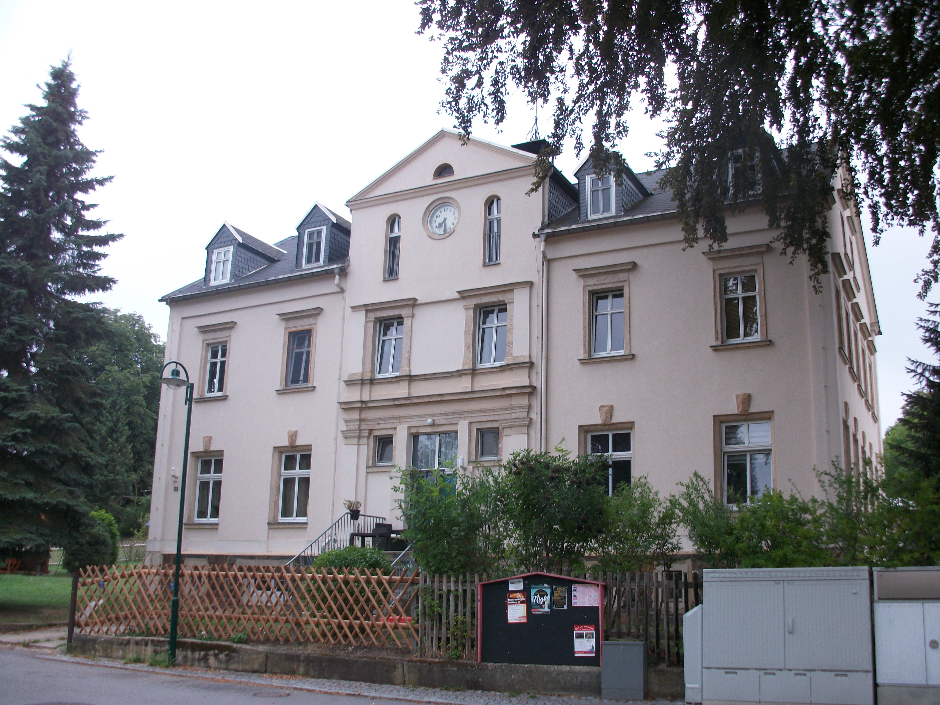 Mitteldorf (Stollberg), Am Anger 8 (Ehem. Schule)